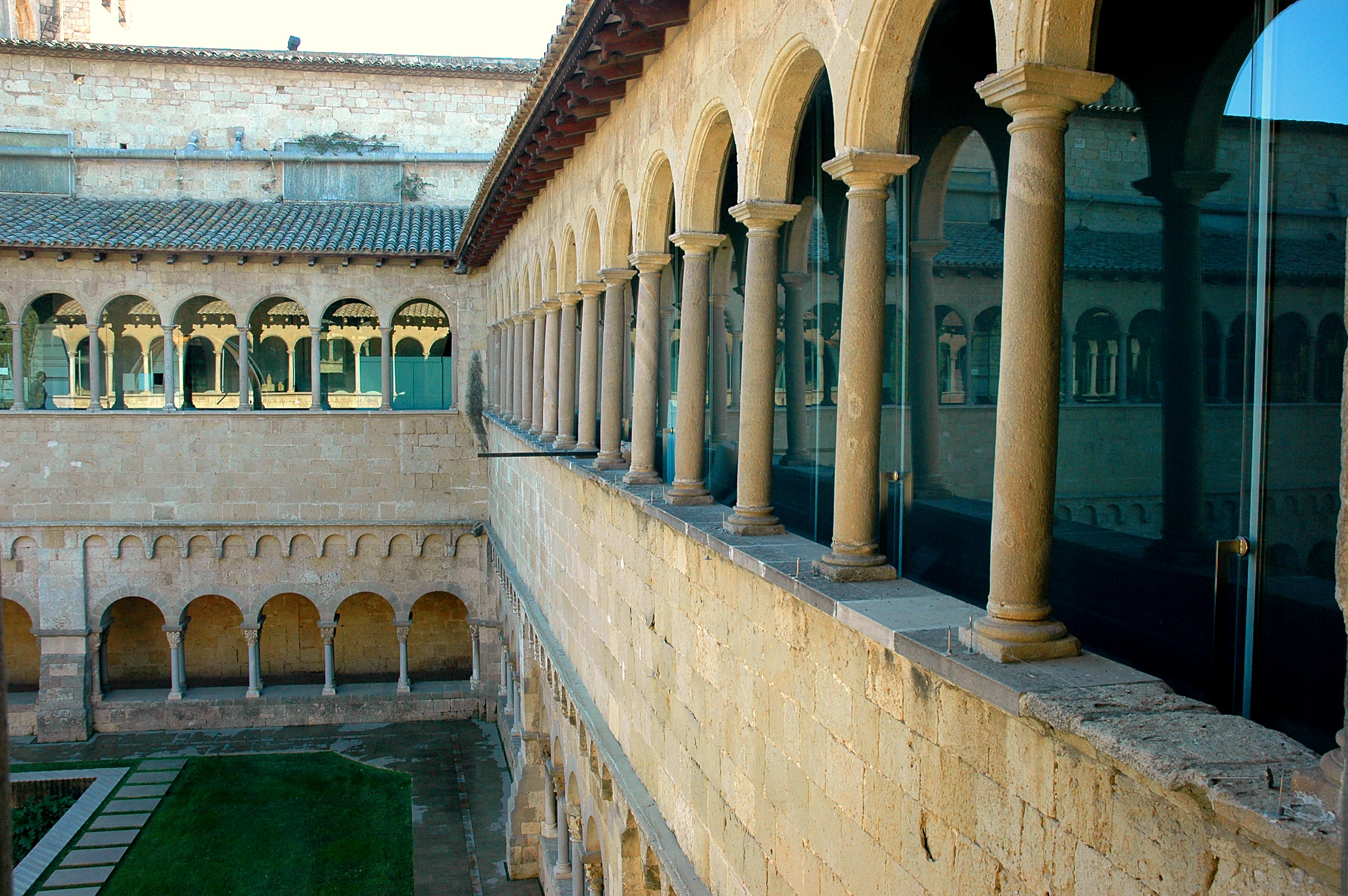 Monestir de Sant Cugat - Claustre superior